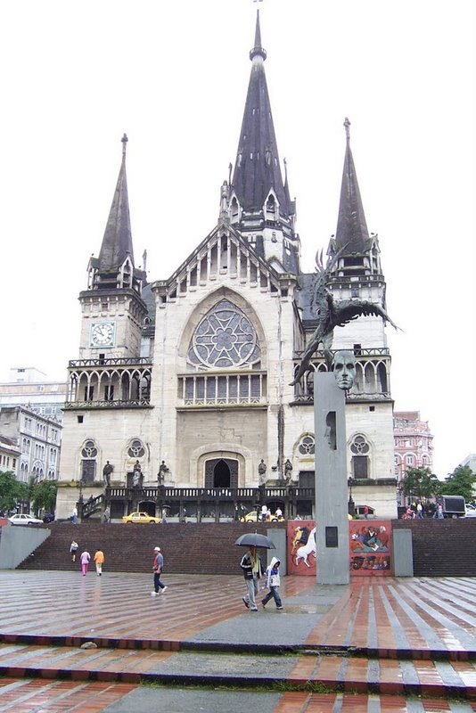 Fachada de la Catedral Basílica Metropolitana Nuestra Señora del Rosario de Manizales